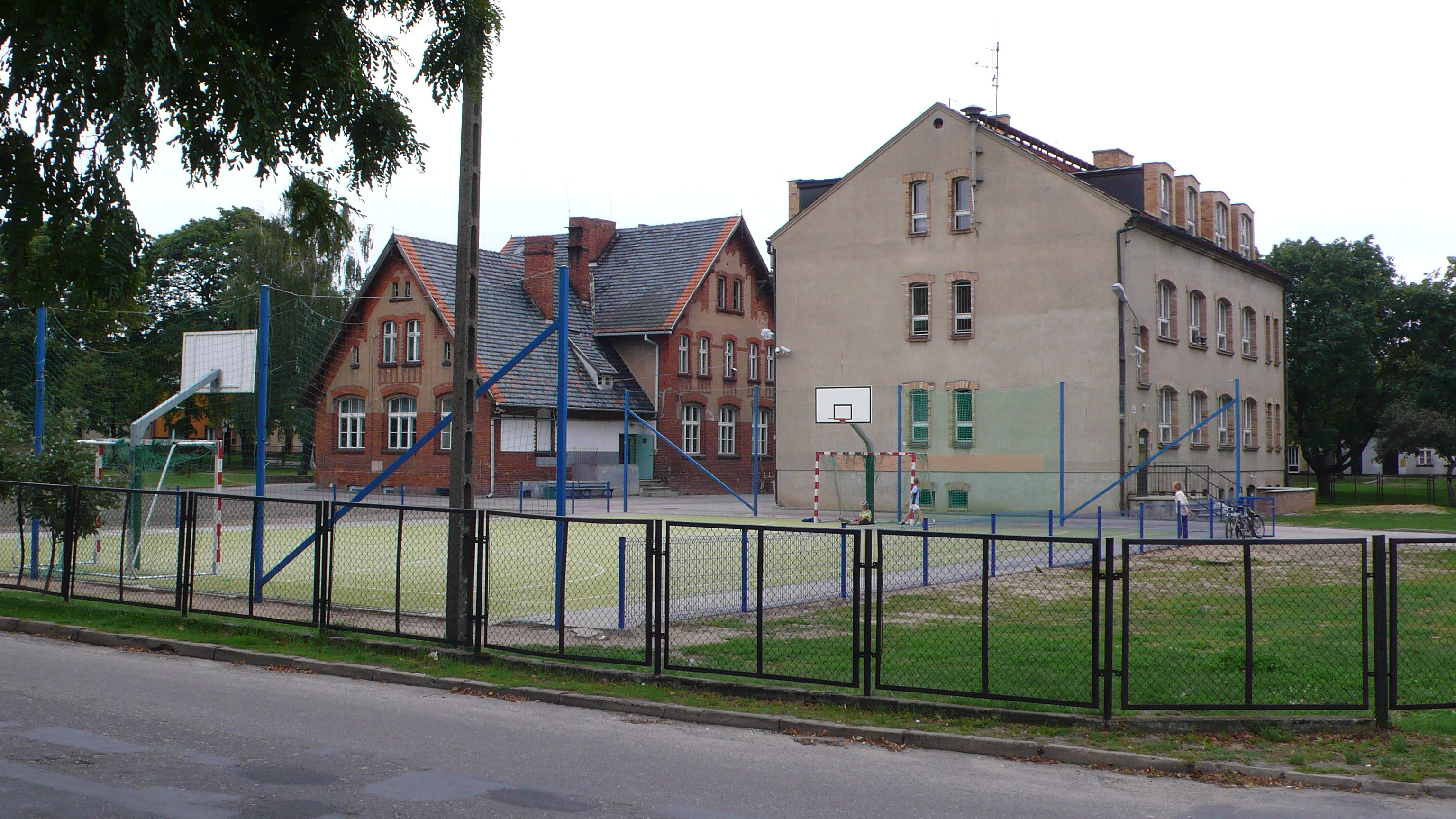 Rynek Zaborowski w Lesznie. Widok od strony północnej. Widoczne budynki Szkoły Podstawowej nr 4 w Lesznie.